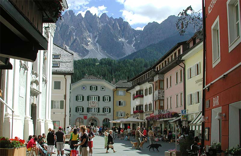 Innichen/San Candido (BZ, Italien), St. Michaelsplatz